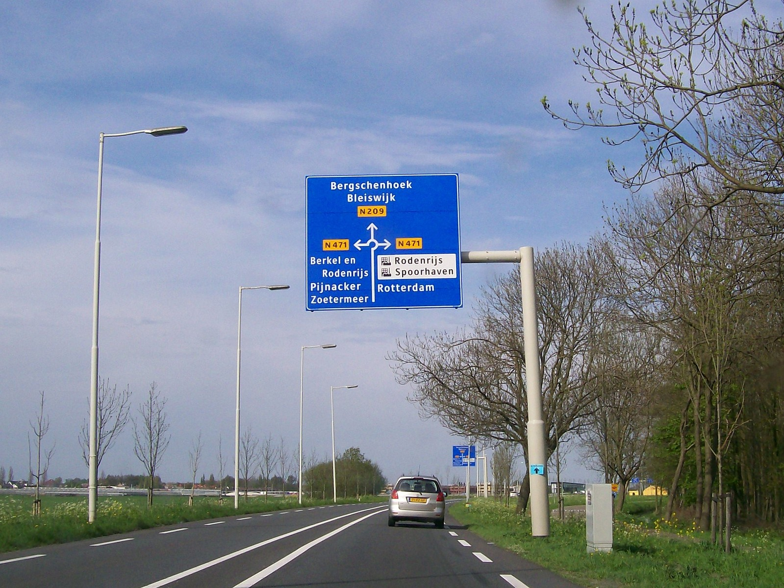 N209 bij turborotonde (aansluiting N471)